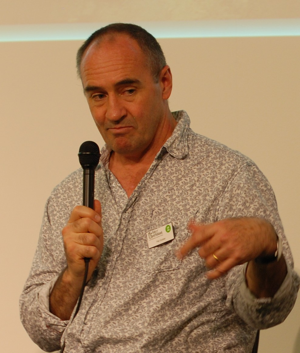 Piet Grobler, Göteborg Book Fair